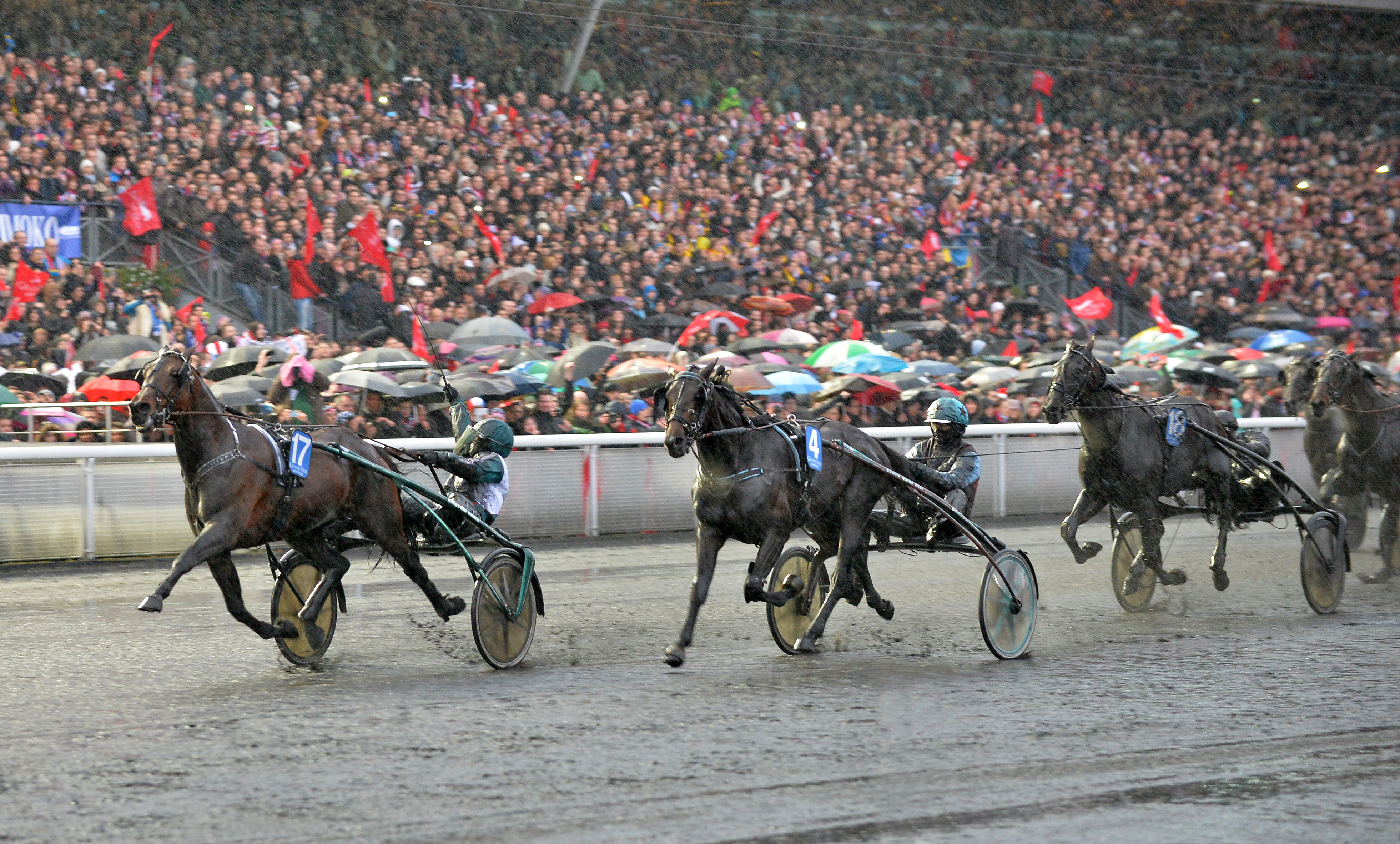 Örjan Kihlström och Maharajah (ekipage nr. 17) vinner Prix d'Amérique 2014.